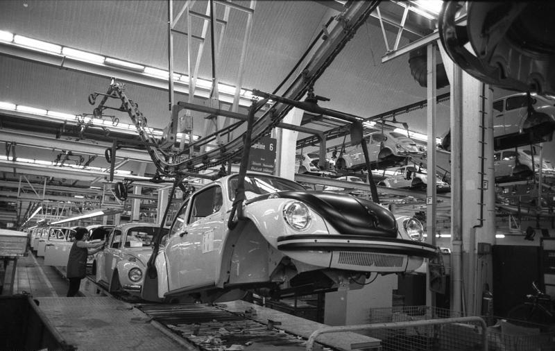 VW-Werk, Wolfsburg Montage-Käfer